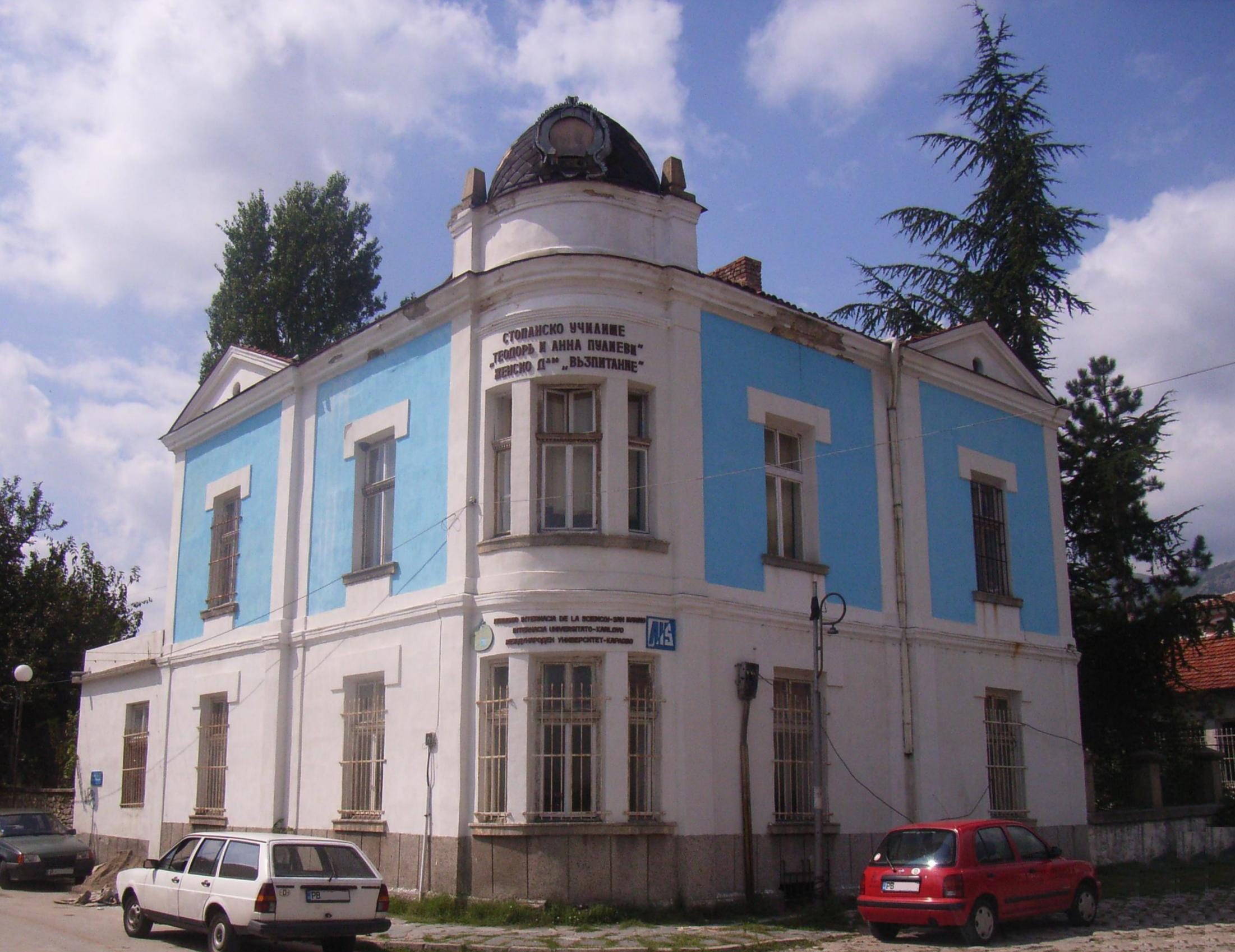 Internacia Universitato Karlovo (IUK, 2005)